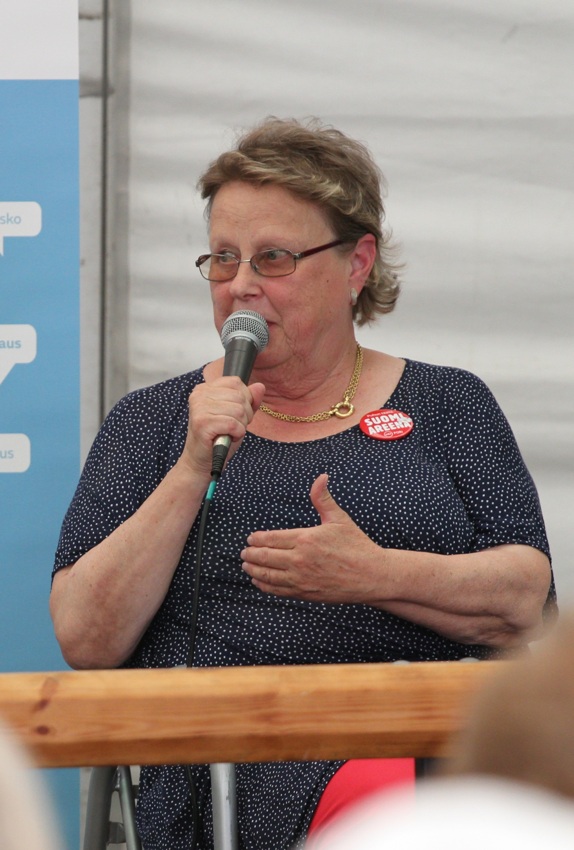 Oikeushammaslääkäri Helena Ranta puhumassa Porissa 2014 Suomi Areena -tapahtumassa.